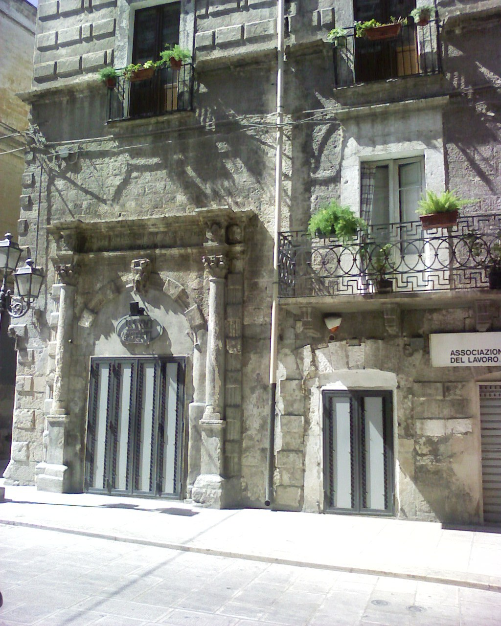 palazzo piepoli - Modugno (bari)-Italy